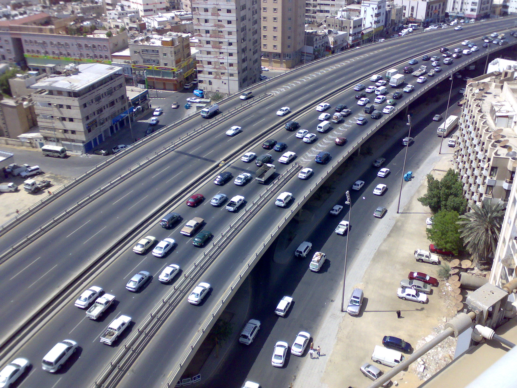 ജിദ്ദ കോർണിഷ് റോഡ്‌